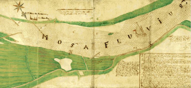 Kaart van de Maas tussen Ammerzoden en Bokhoven uit 1669. Ammerzoden ligt in aan de noordzijde, Bokhoven aan de zuidzijde van de Maas (op de kaart ligt het noorden onder). De kaart is waarschijnlijk gemaakt in verband met een geschil tussen de heren van beide dorpen over de aanleg en lengte van een krib op de noordoever.